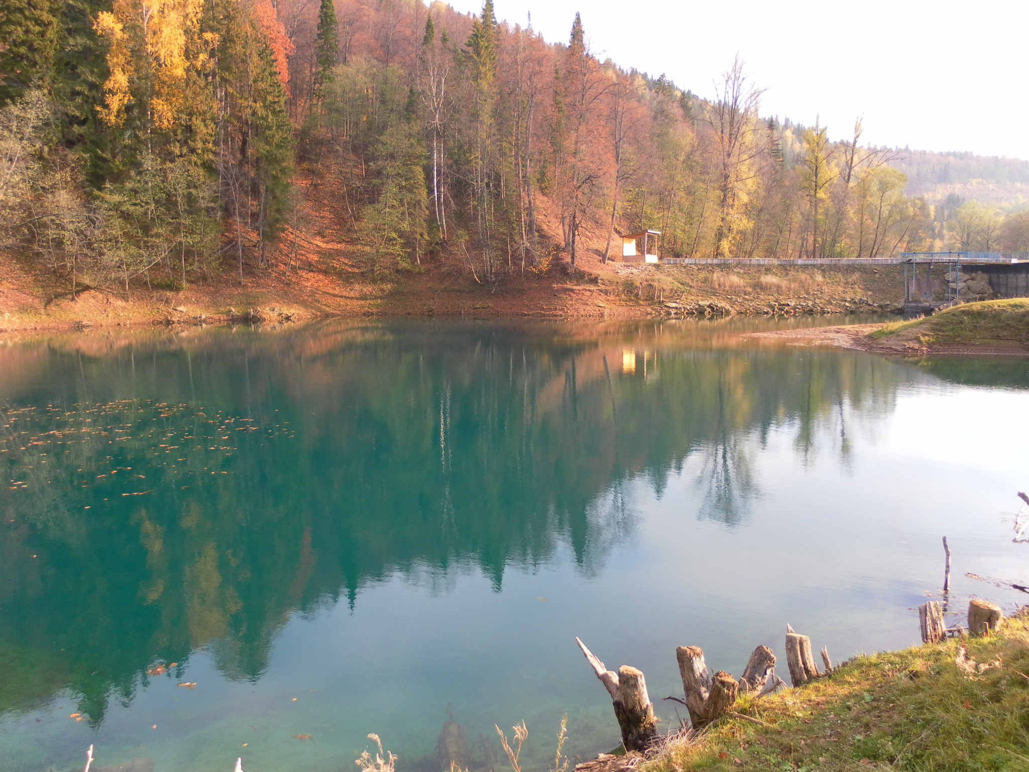 Это снимок чаши родника